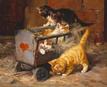 Die Einquartierung